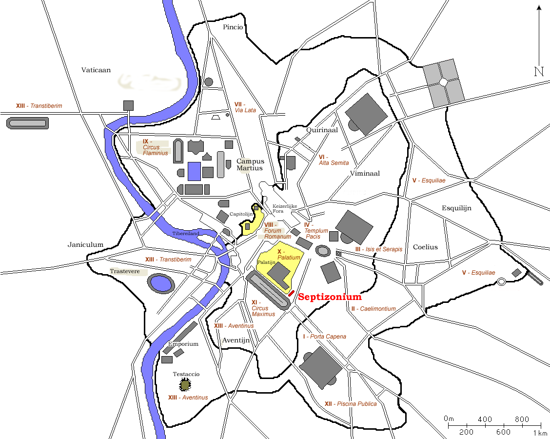 Kaart van antiek Rome waarop het Septizonium is uitgelicht. Kaart is afkomstig van FR:wiki en door mij naar een Nederlandse versie bewerkt. Auteurs: nl::fr:User:ColdEel en Gebruiker:Joris1919